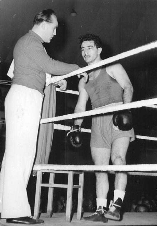 Laslo Papp Zentralbild Bez.Red.Erf. 13.12.1955 Boxländerkampf Ungarn- DDR 16:4. Am Sonntag, dem 11. Dezember 1955 fand in der Thüringenhalle in Erfurt ein Boxländerkampf Ungarn- DDR statt. Die DDR Vertretung unterlag mit 16:4 Punkten den ungarischen Gästen. UBzDer zweifache Olympiasieger und verdiente Meister des Sports Laslo Papp.